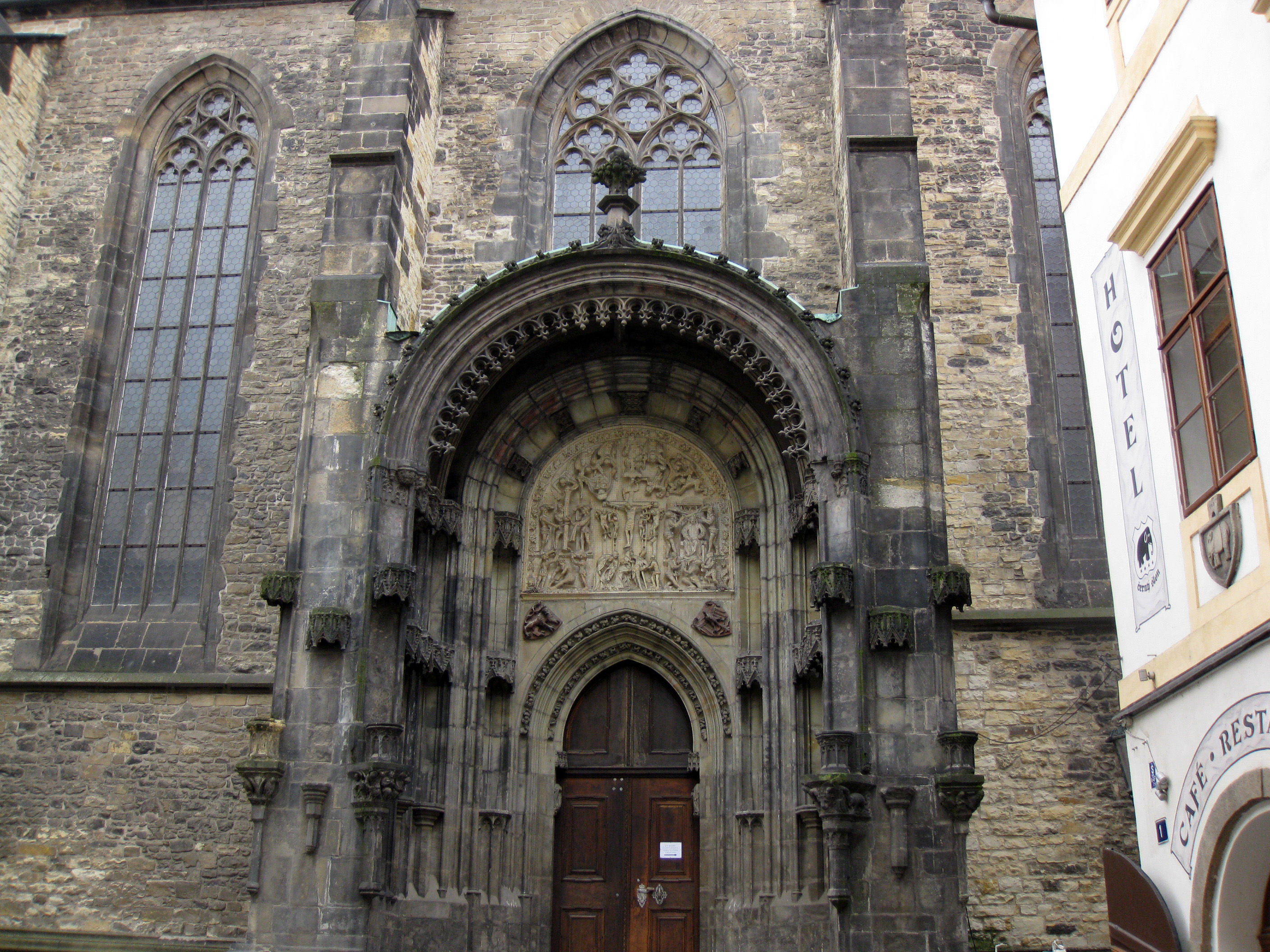 Praha 1-Staré Město, Týnský chrám.